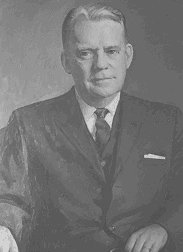 Governor Lane Dwinell. From